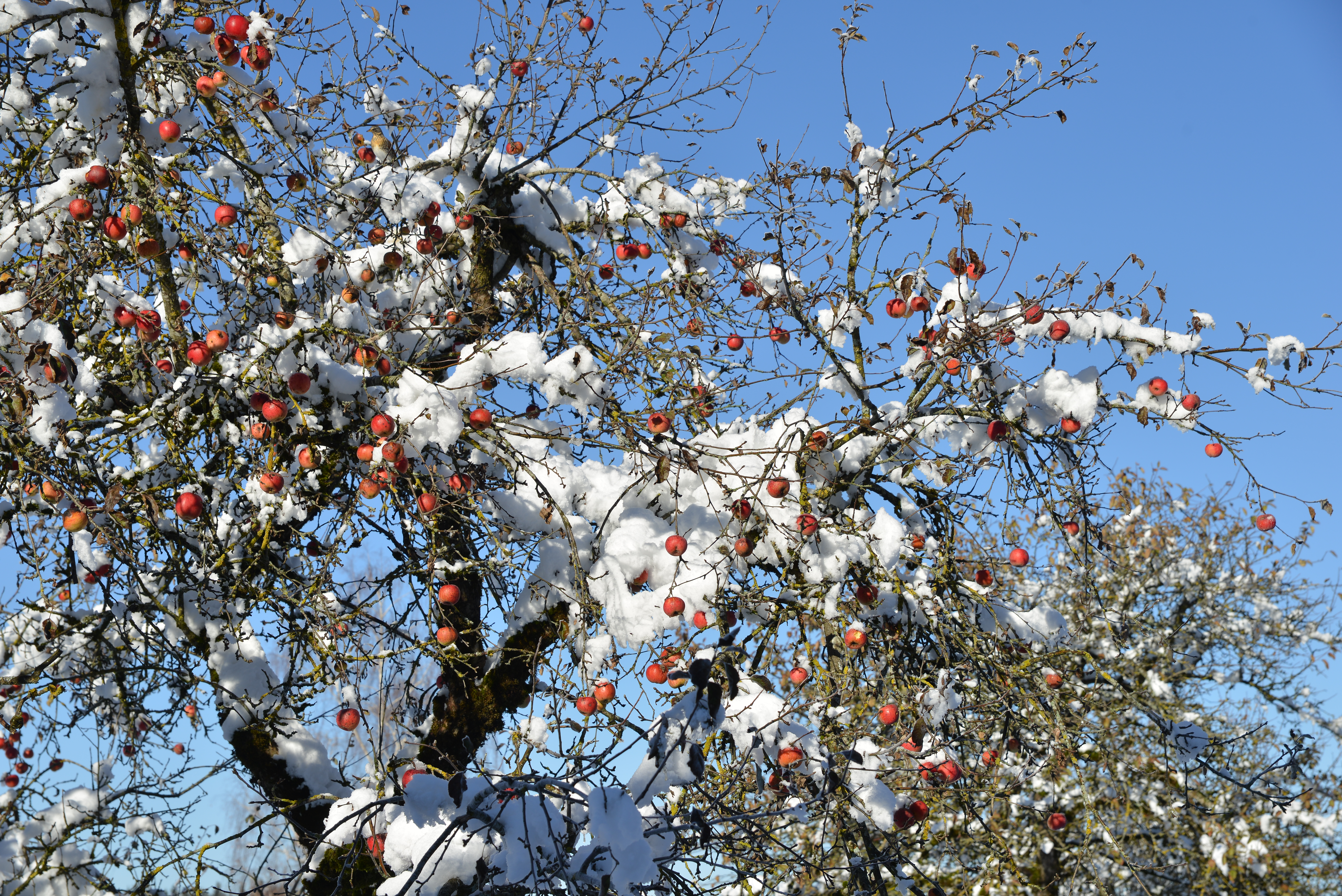 Apfelbaum im Dezember.